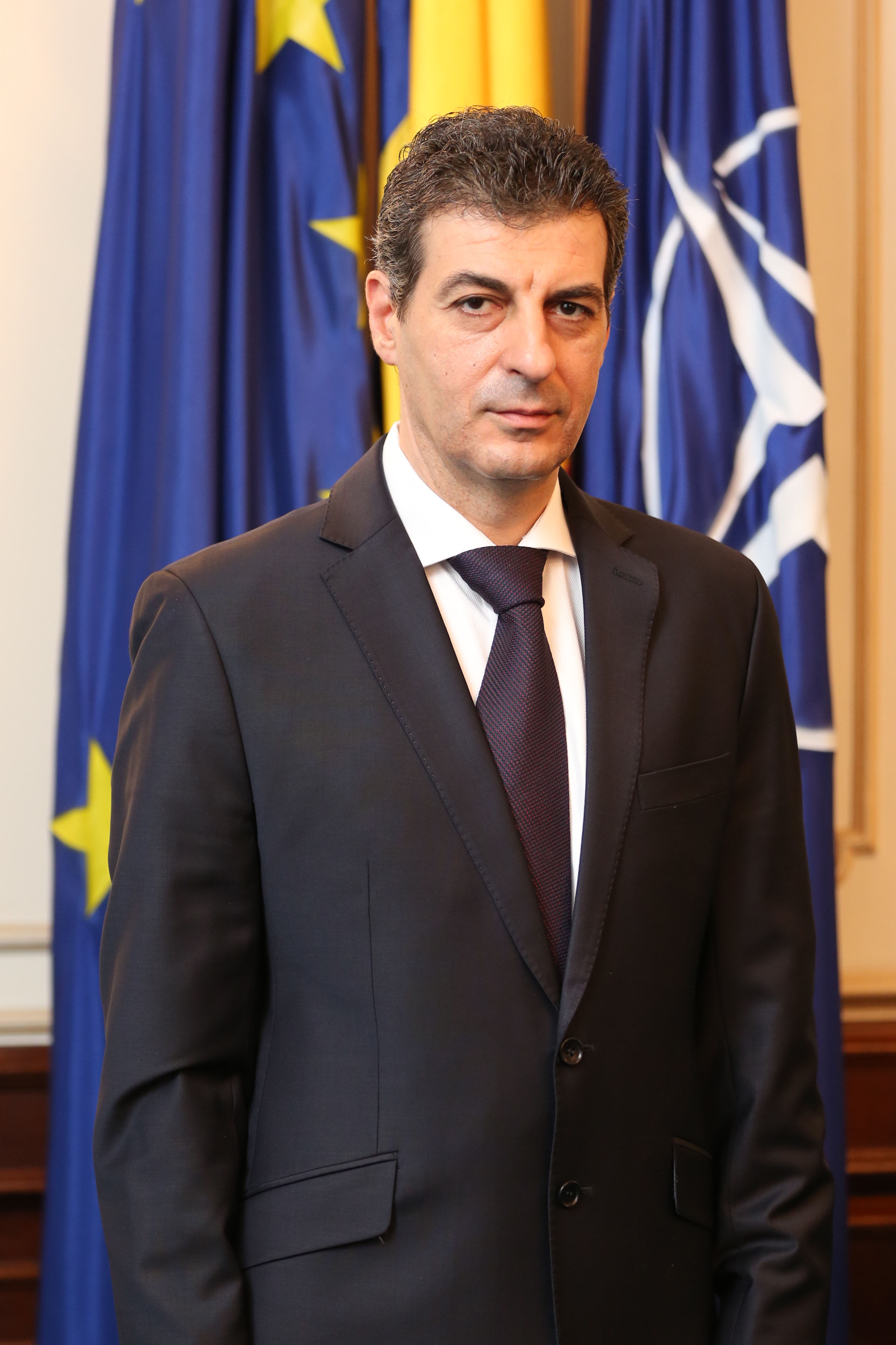 Mihnea Ioan Motoc, ministrul apărării naţionale: 17.11.2015 - 05.01.2017